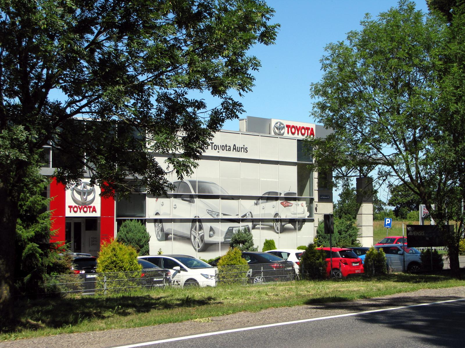 Wojcieszyce. Salon samochodowy.